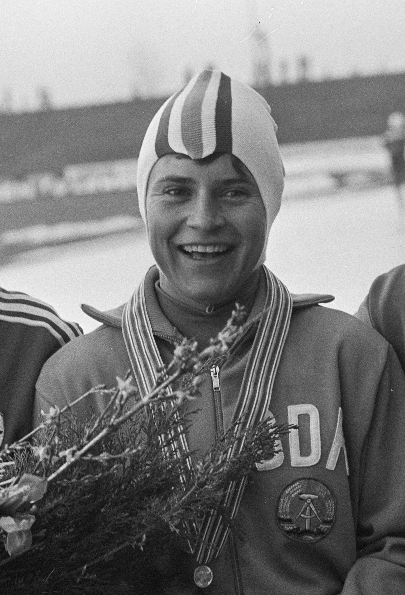 Karin Kessow, Wereldkampioenschappen, Assen